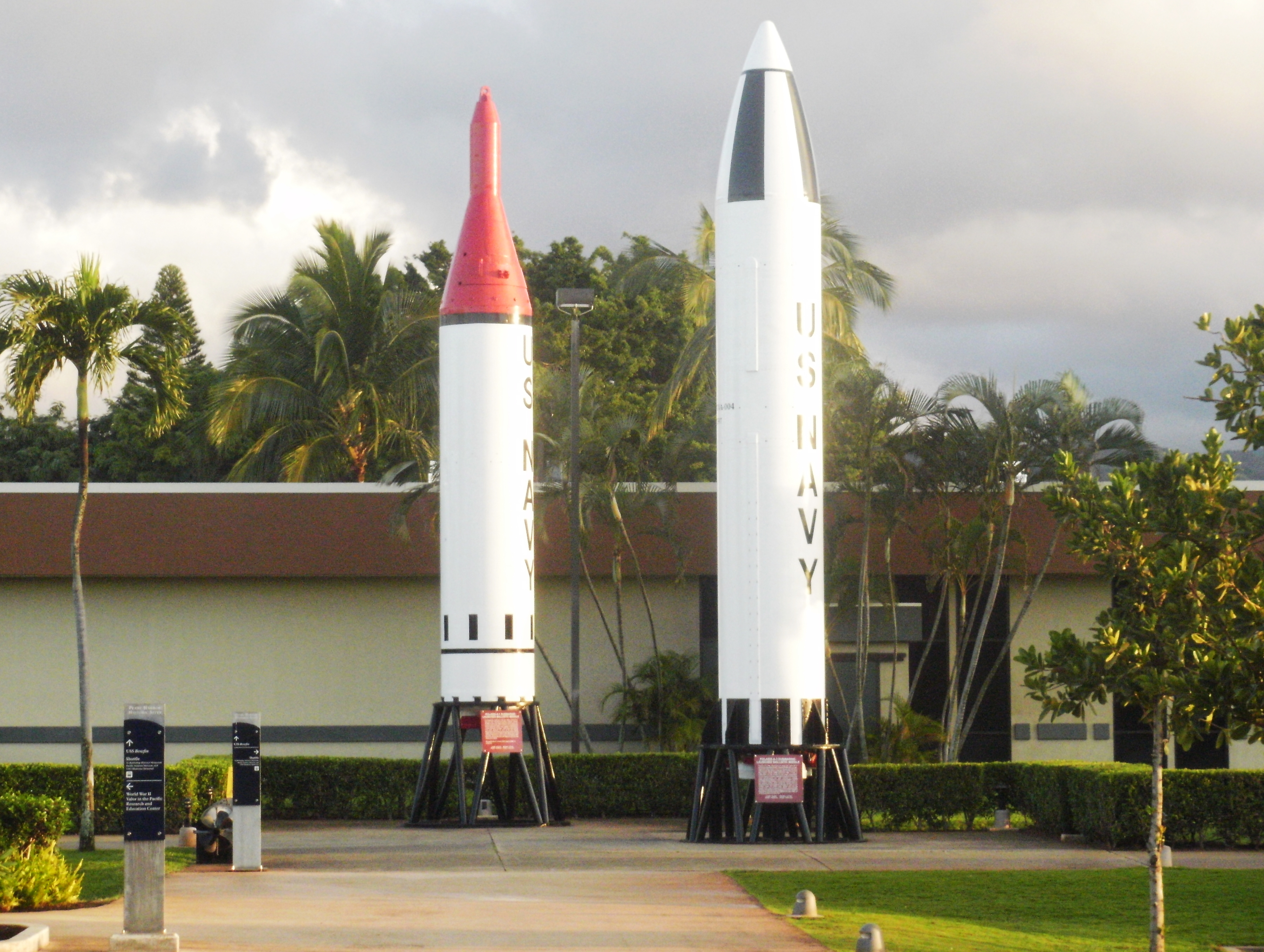 Honolulu, HI, USA